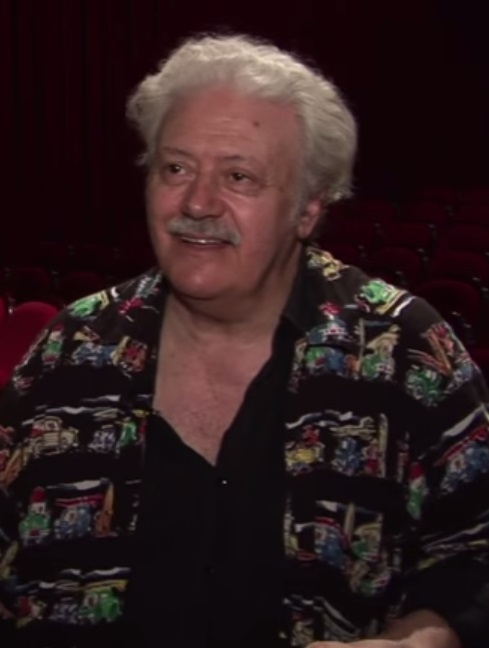 El actor y director de escena español Mario Gas